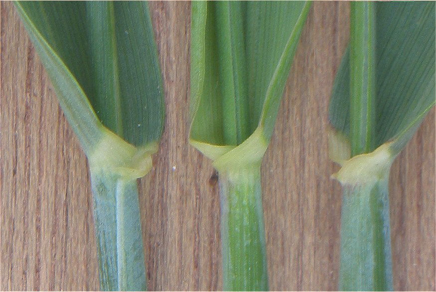 (Oortjes bij rogge) Secale cereale auricles